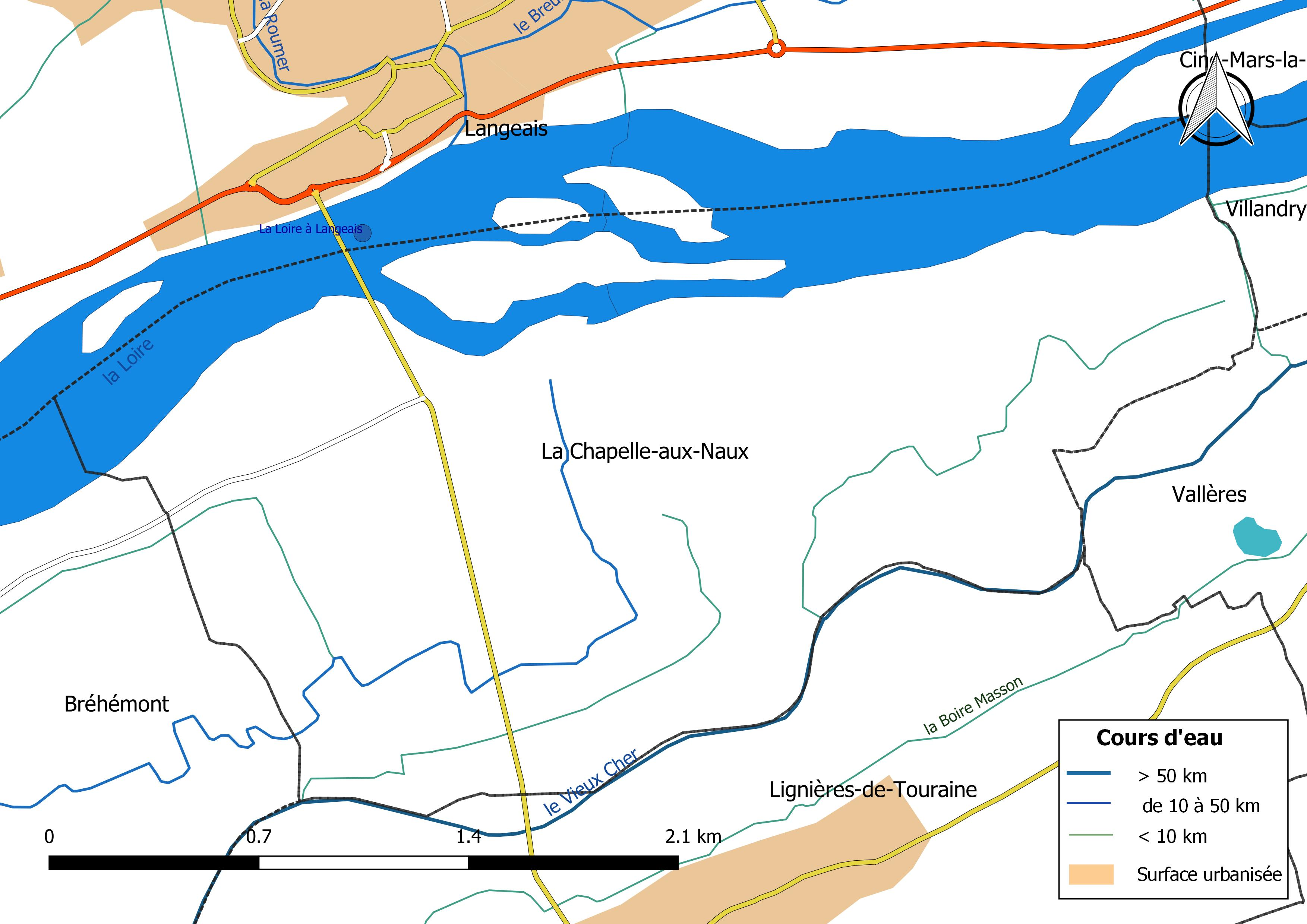 Carte du réseau hydrographique de la commune de La Chapelle-aux-Naux (France).